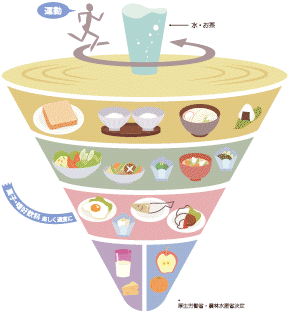 厚生労働省による食事バランスガイド